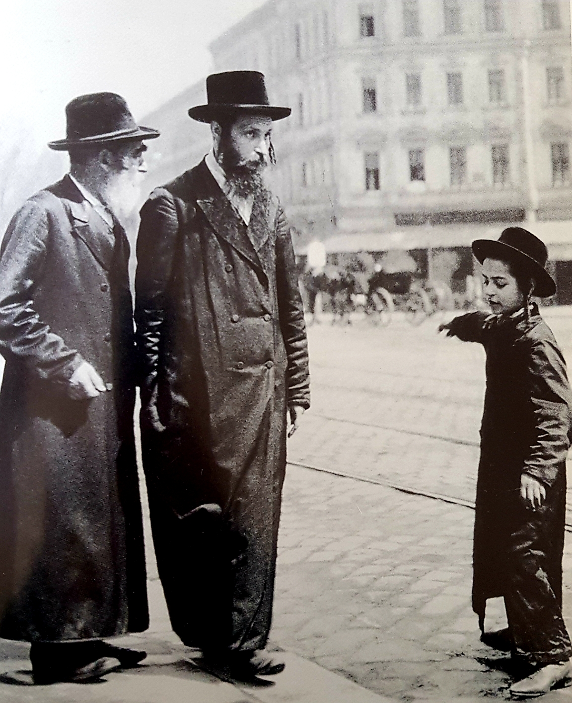 Jüdische Immigraten aus dem Osten in der Leopoldstadt